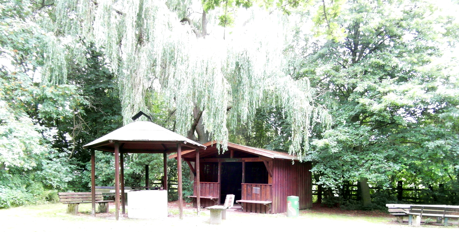 Hier grillt man manchmal selber